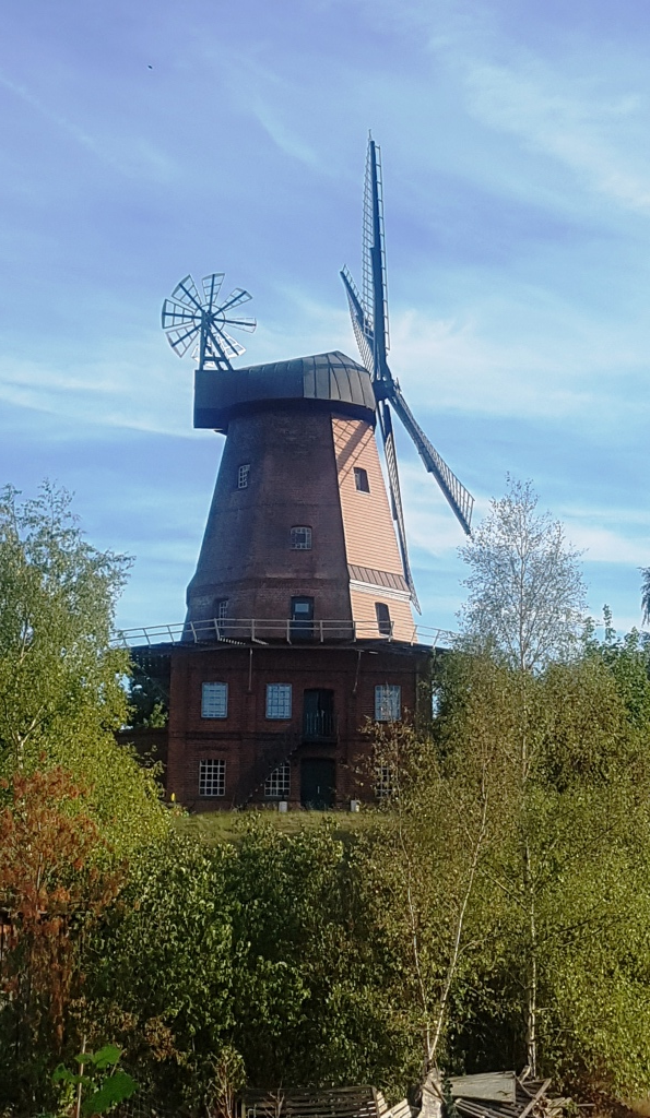 Die gut erhaltene Mühle in Hittbergen mit ihrem quadratischen Unterbau. Die Mühle dient heute als Wohnmühle, daher ist sie nur von außen zu besichtigen.